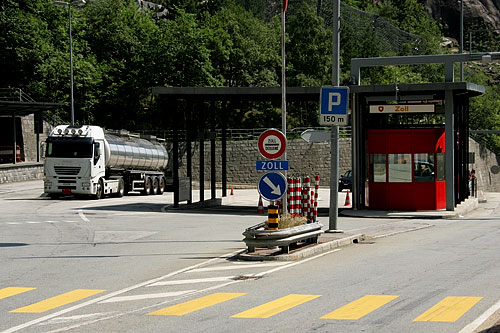 Zoll in Gondo